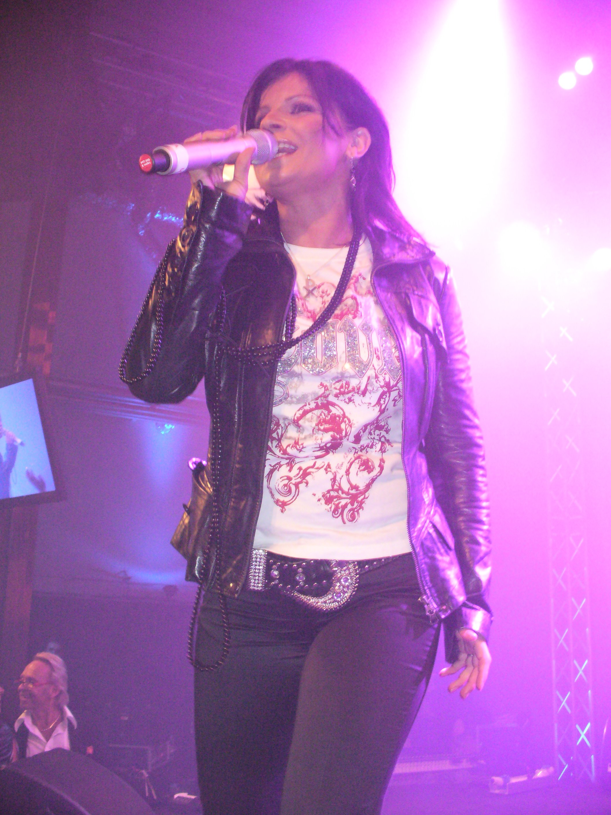 Carola Häggkvist performing at an event for TV3 Sweden.